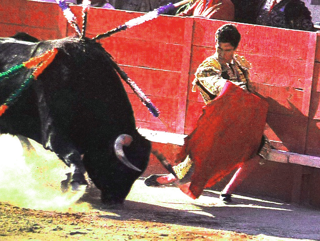 Joselito_passe_estribo2++.JPG